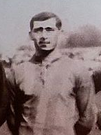 Jacinto Perazzo, futbolista de Rosario Central en 1924.